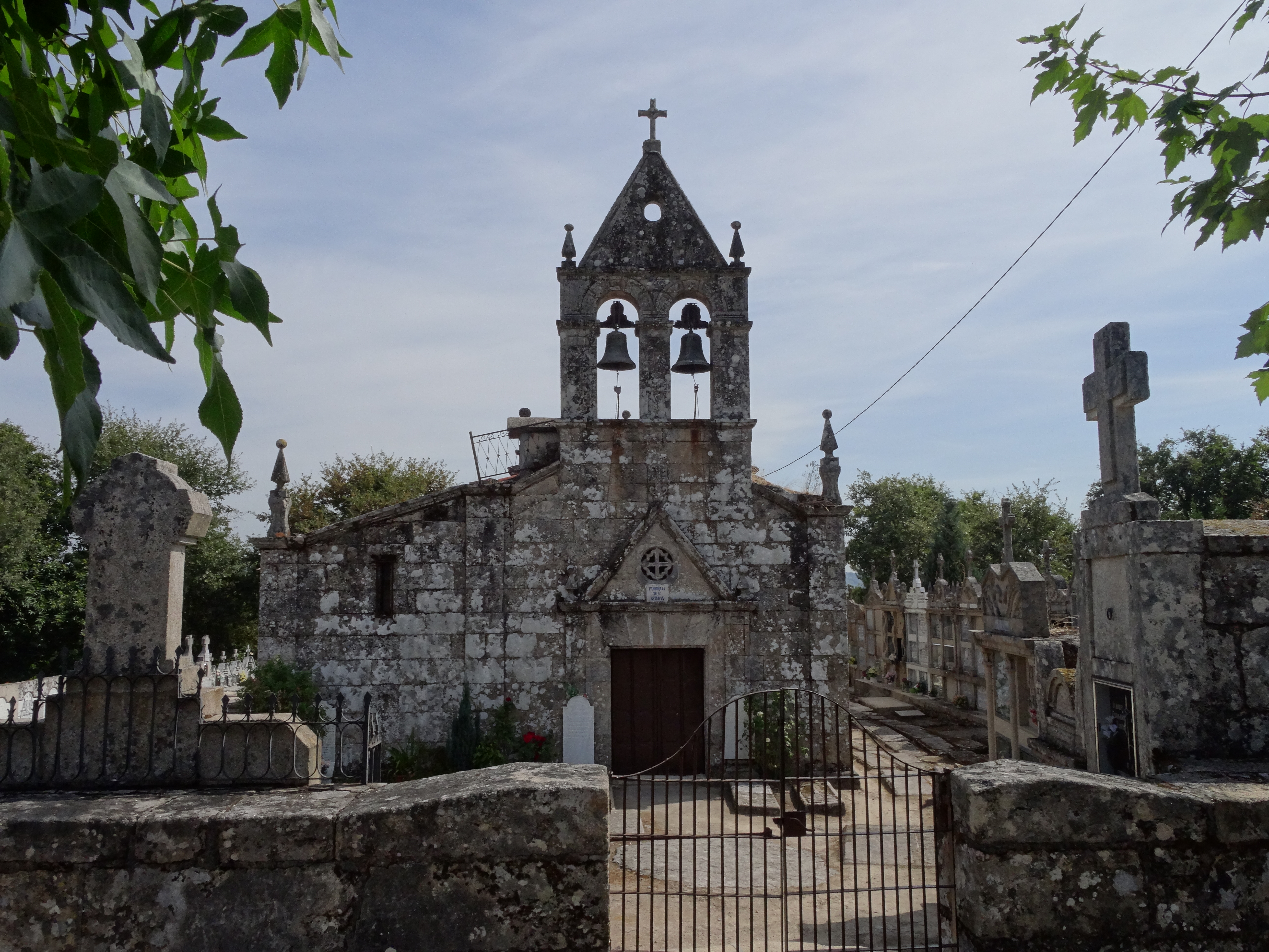 Ver título.